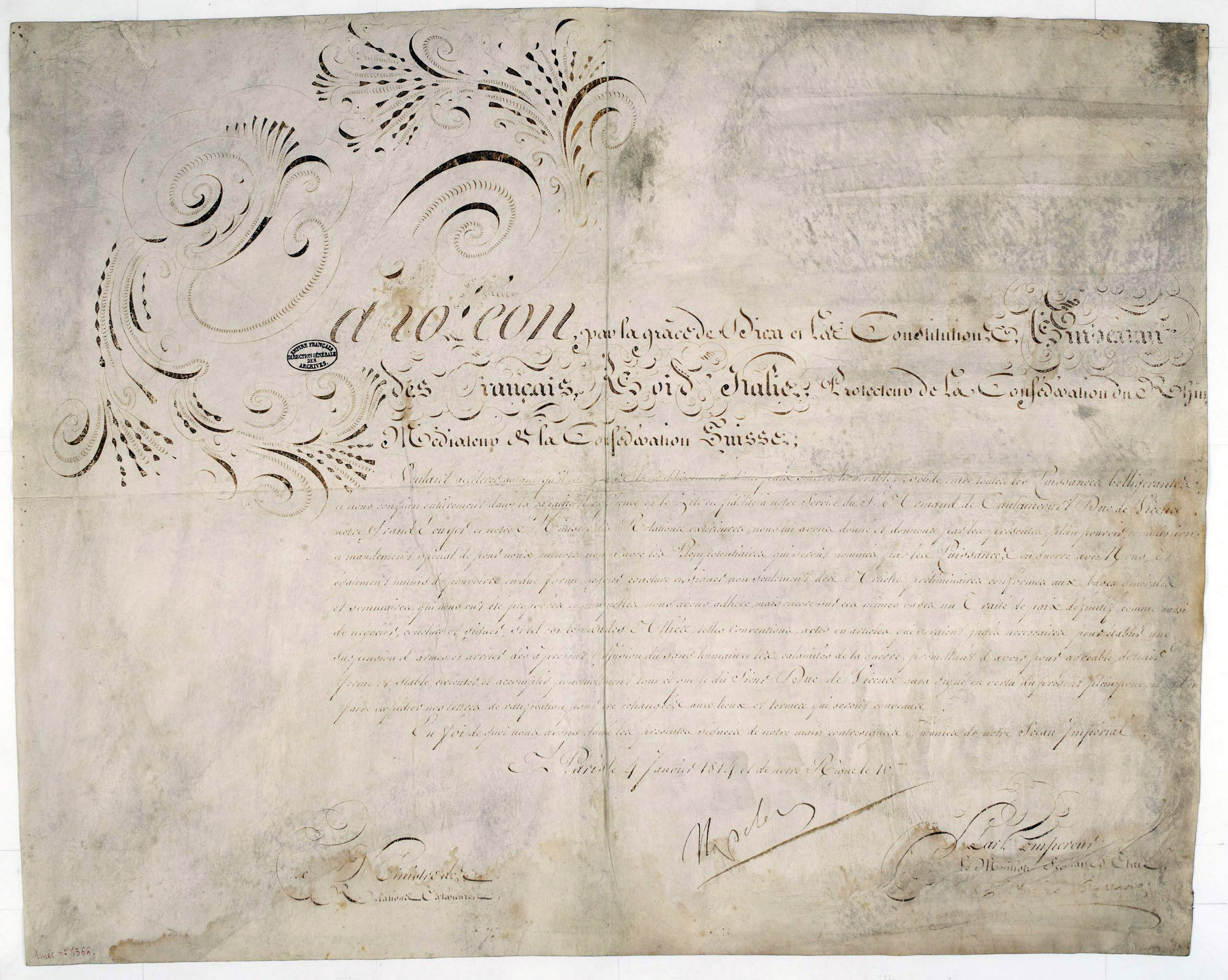 Lettre de Napoléon accordant les pleins pouvoirs à Caulaincourt, ministre des Relations extérieures, pour négocier avec les Alliés. La lettre est signée par Napoléon et contresignée par le ministre secrétaire d’État.